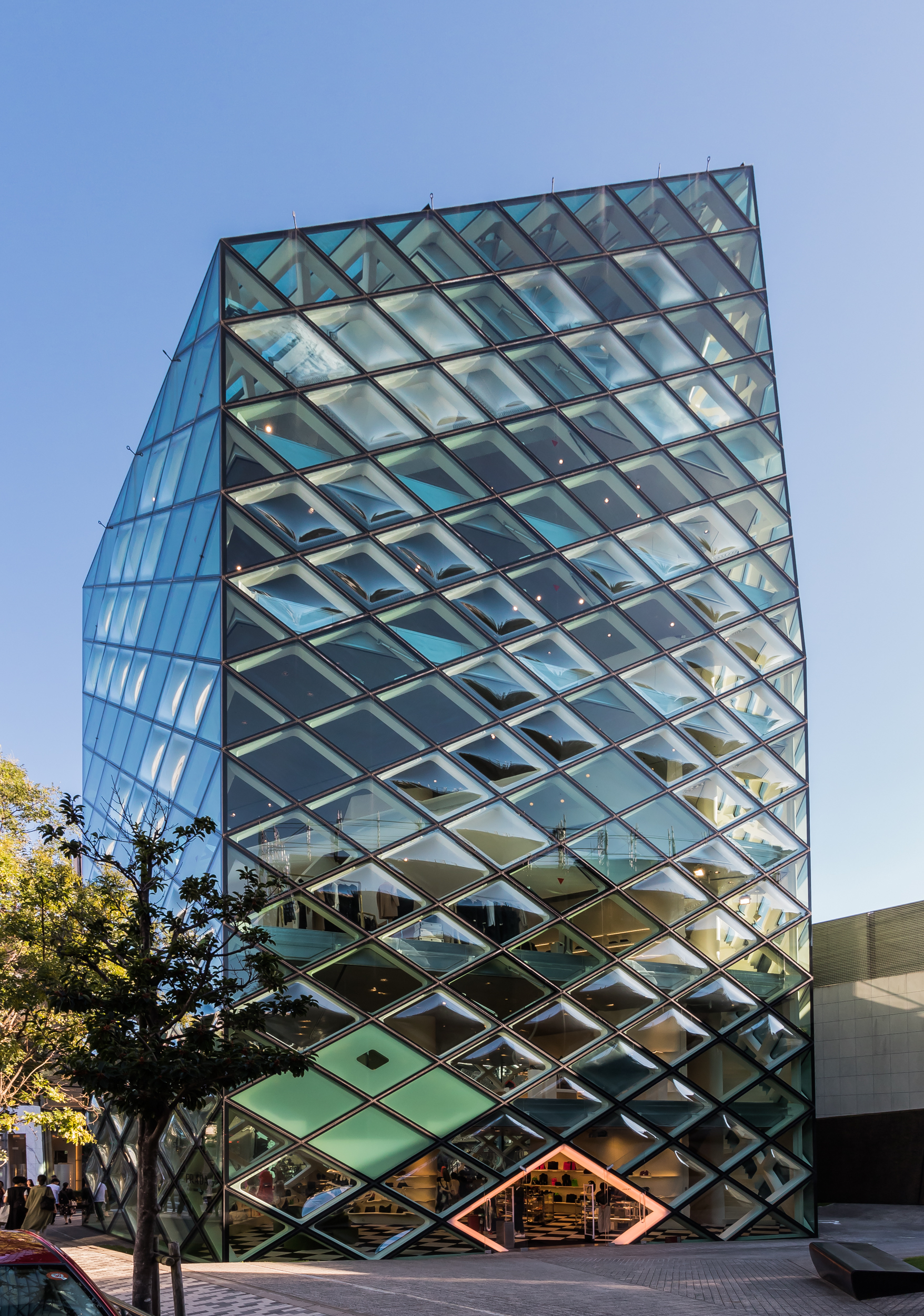 プラダ青山店。ヘルツォーク&ド・ムーロン設計。